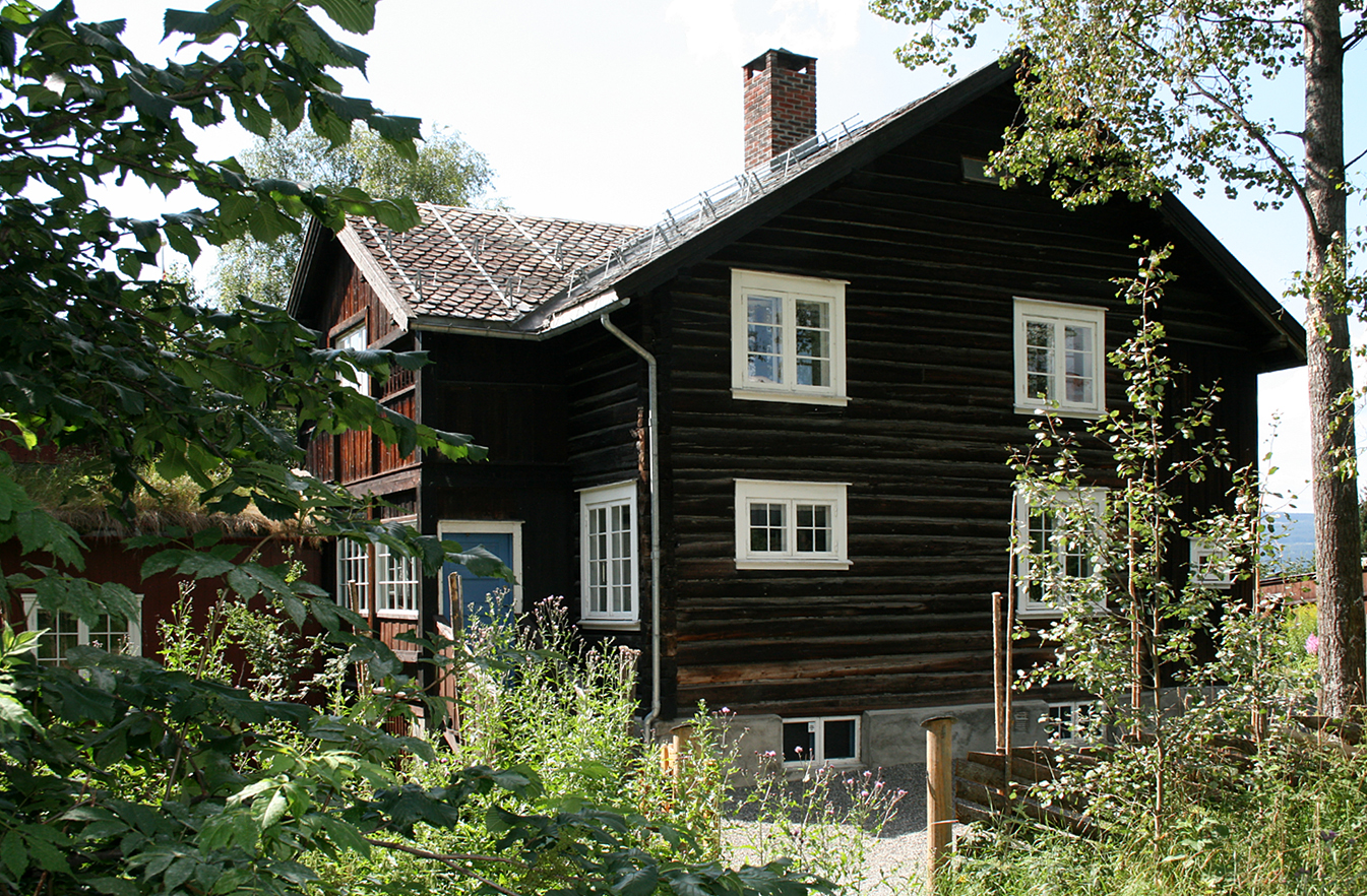 Røssumstua på Bjerkebæk, Lillehammer. Fra Røssum i Kvam, gjenreist på tomta i 1918. Freda 1982.